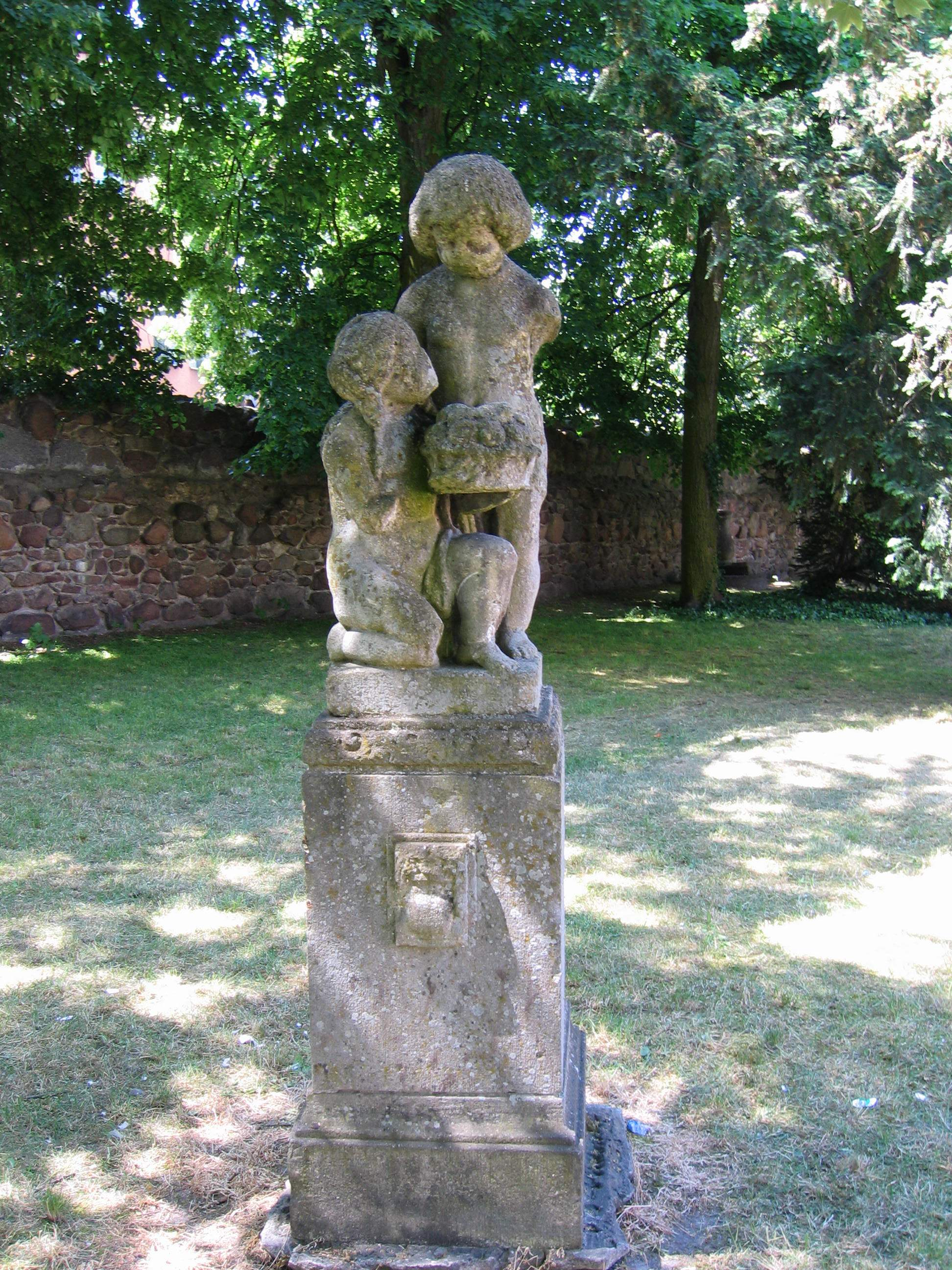 Gryfino, ul. Bolesława Chrobrego 48 - willa z powozownią, /otoczenie/